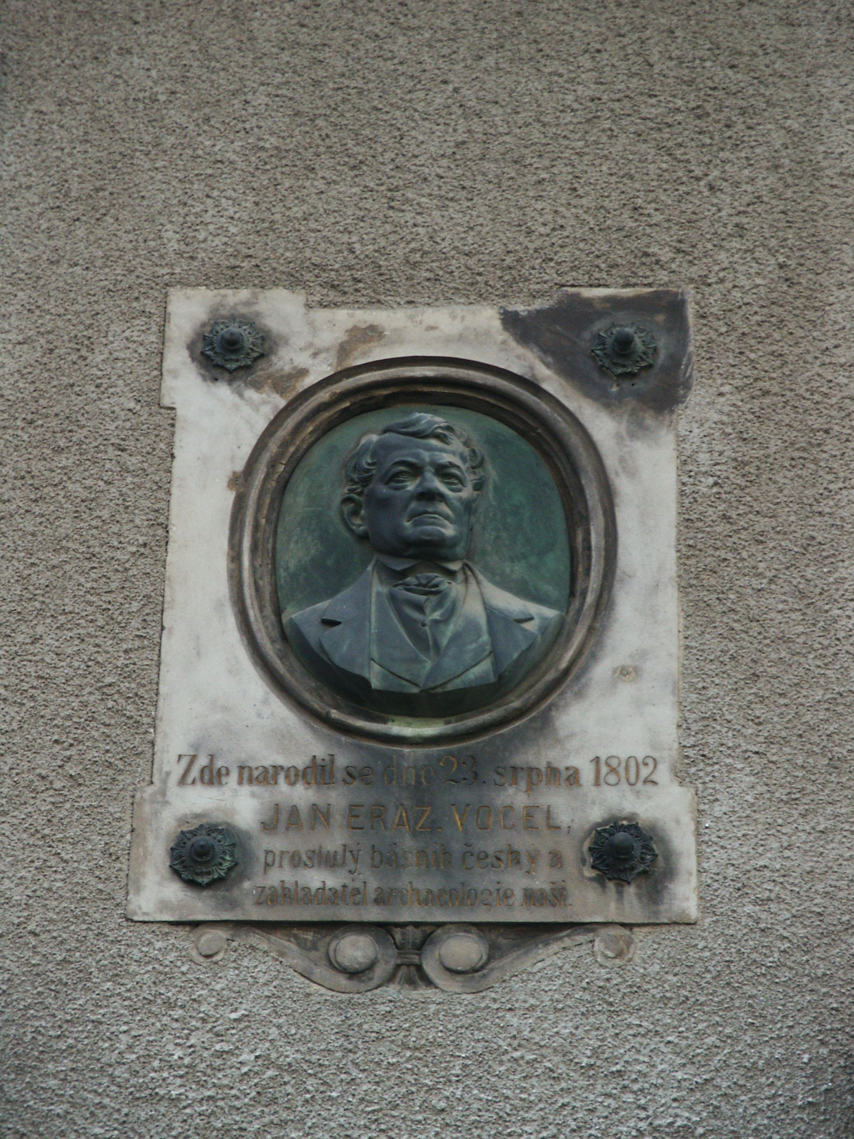 Dům čp. 349, Vocelova 349/10, Vnitřní Město, Kutná Hora.